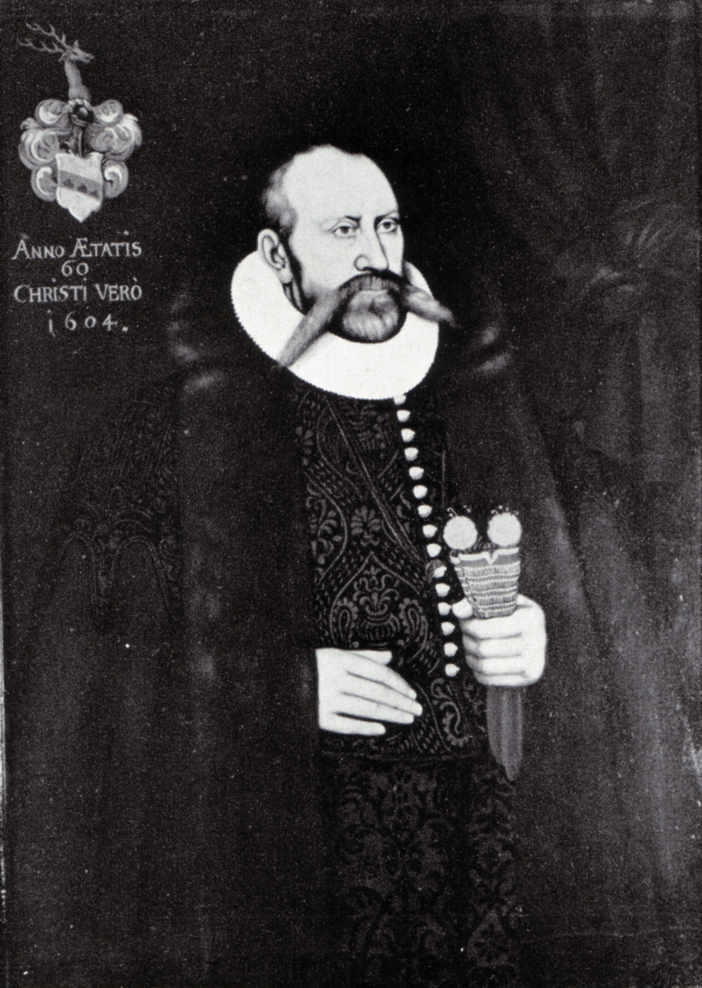 Gotthard V. von Hoeveln (* ca. 1543; † 16. März 1609), Bürgermeister der Hansestadt Lübeck